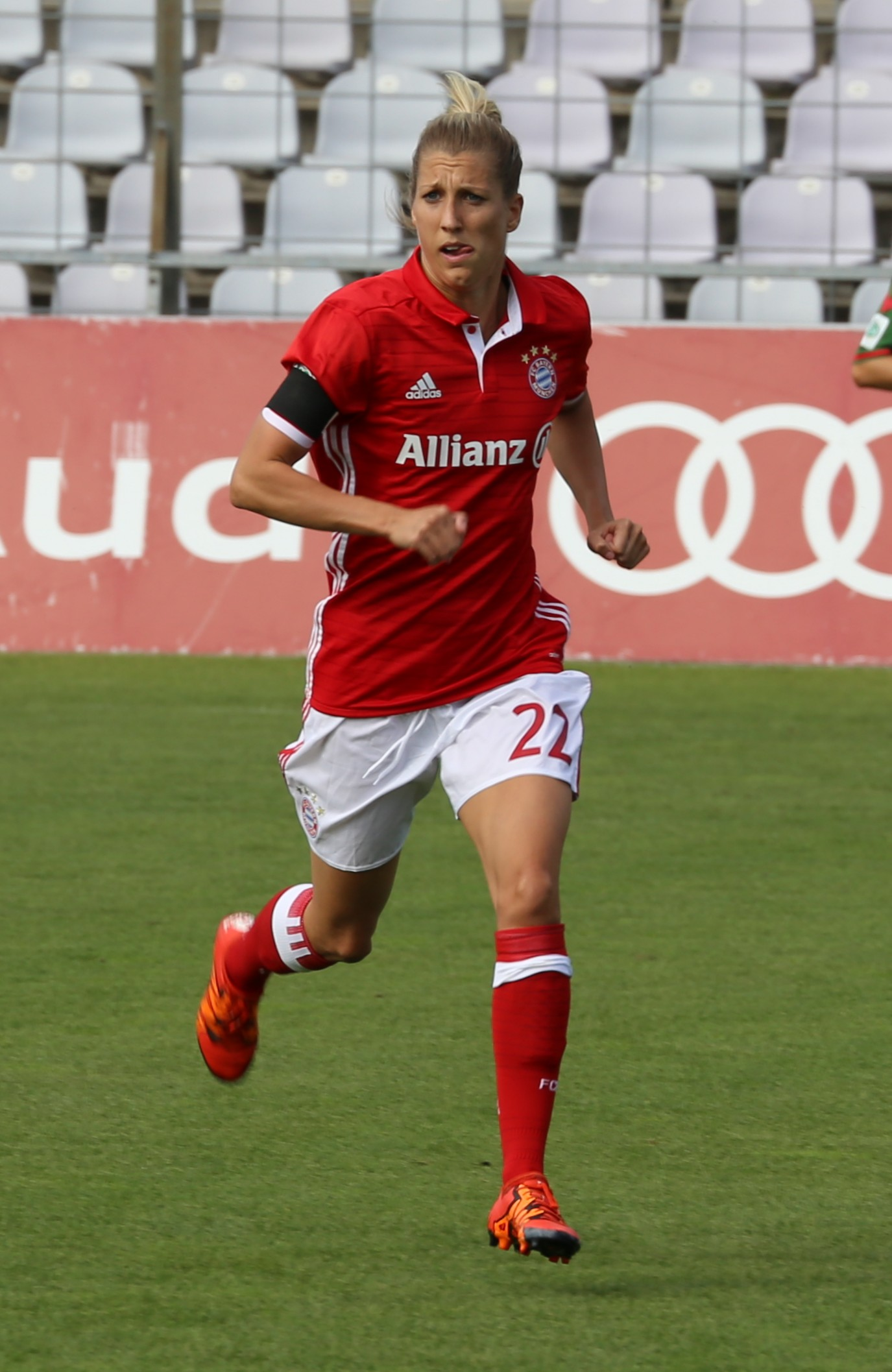 Verena Faißt, FC Bayern München, beim Frauen-Bundesliga-Spiel FC Bayern München gegen SC Freiburg am 3. September 2016 im Stadion an der Grünwalder Straße (Ergebnis war 1:1).